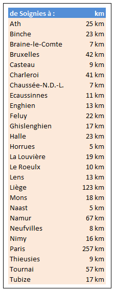 Soignies distances en km